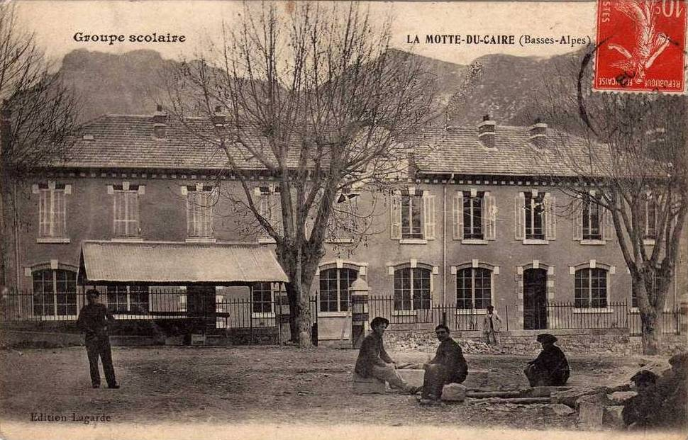 groupe scolaire La Motte du Caire (Alpes-de-haute-provence)